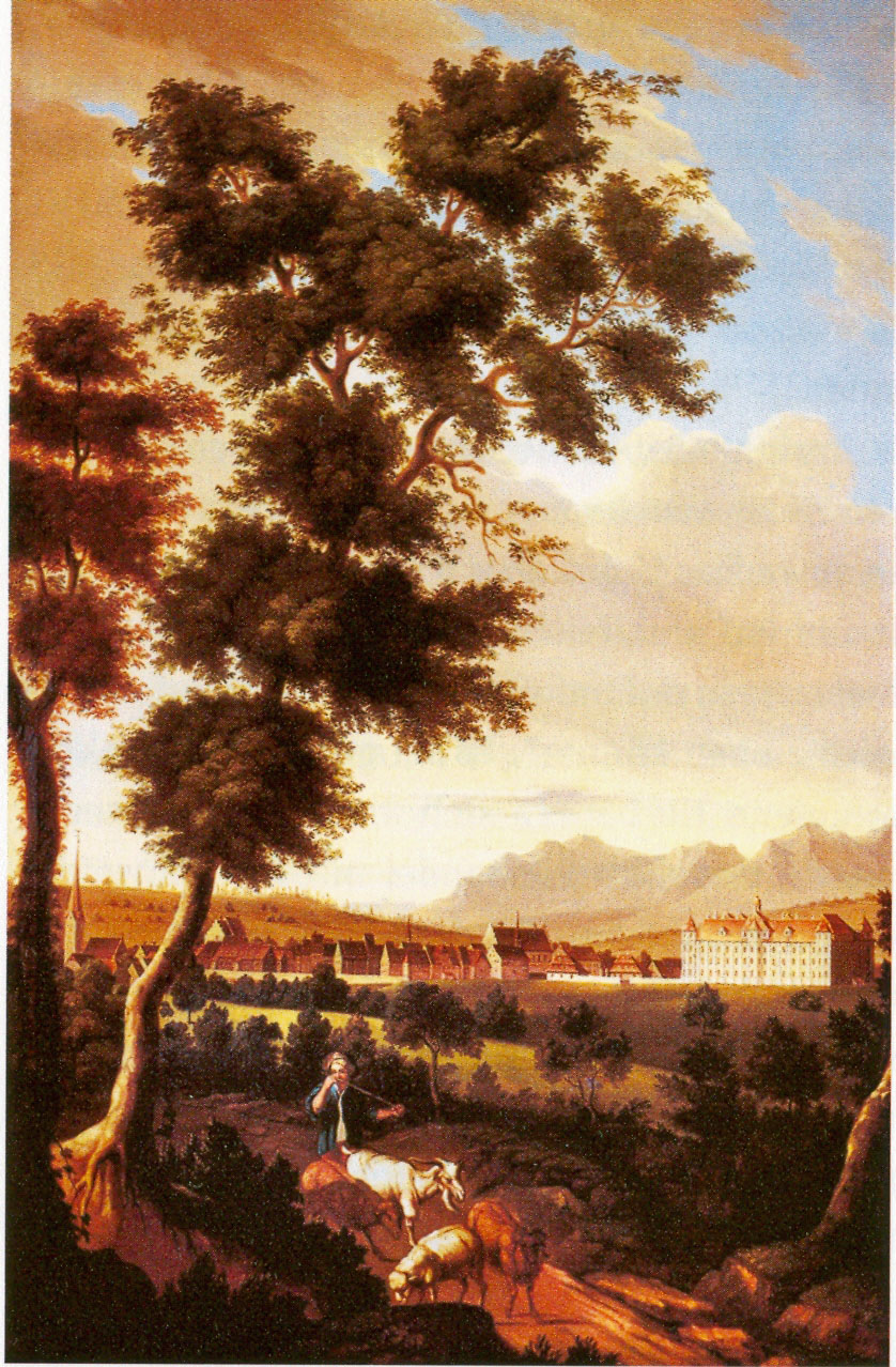 Die Schlösser der Grafen von Montfort